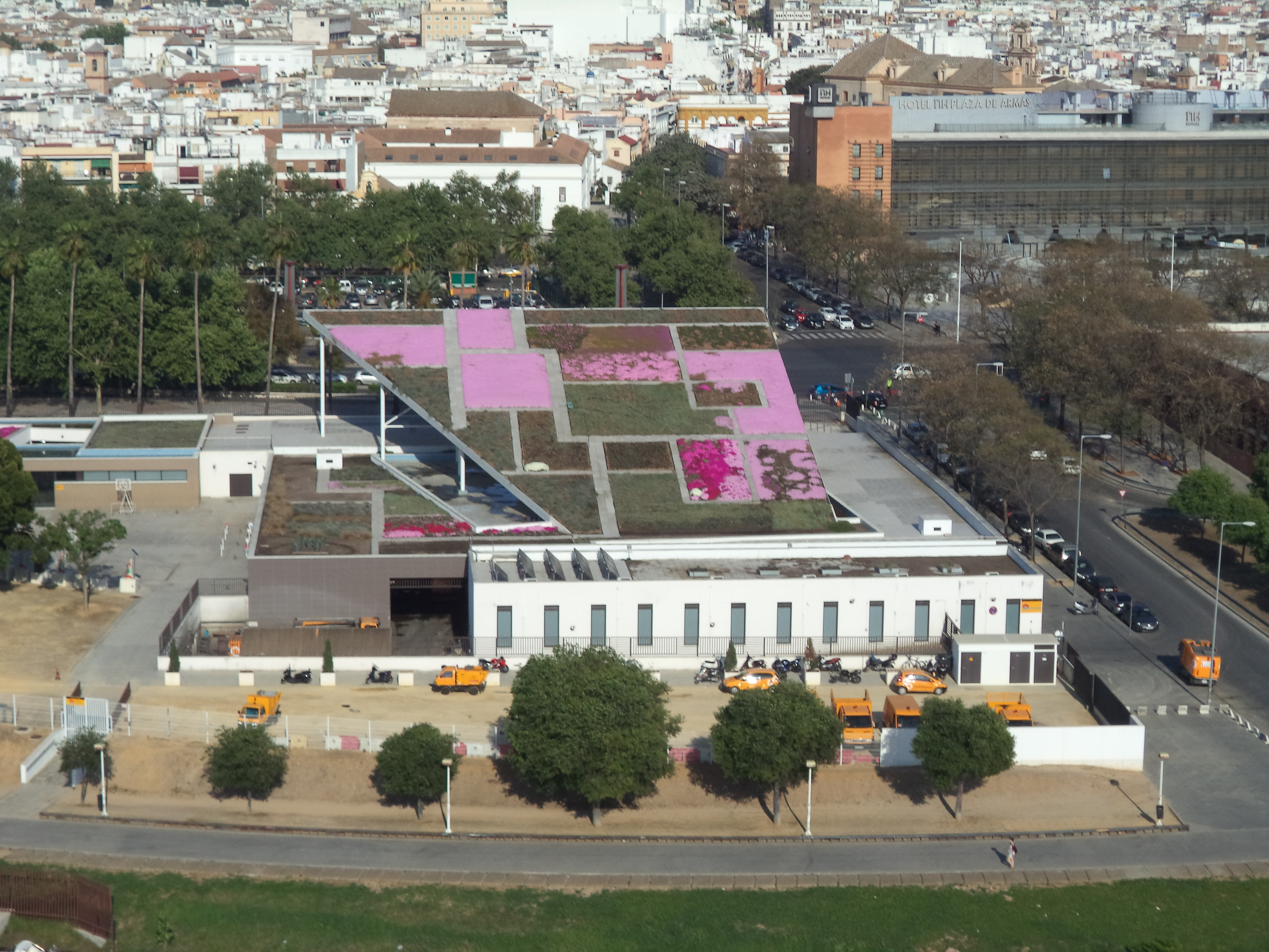 Sede de Lipasam desde la Torre Schindler de Sevilla. Fue la antigua estación de telecabina de la Expo 92